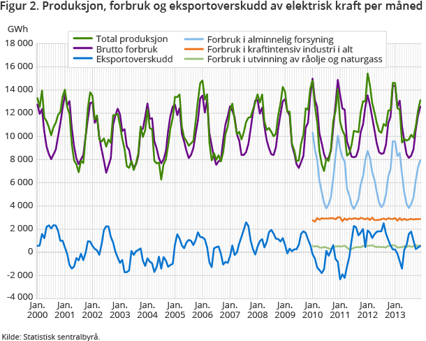 Statistisk sentralbyrå.